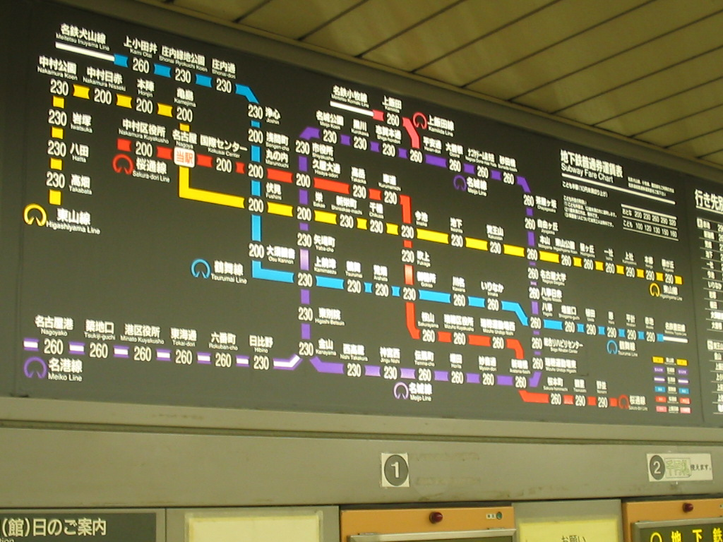 metrotarief op een scherm, metro Nagoya